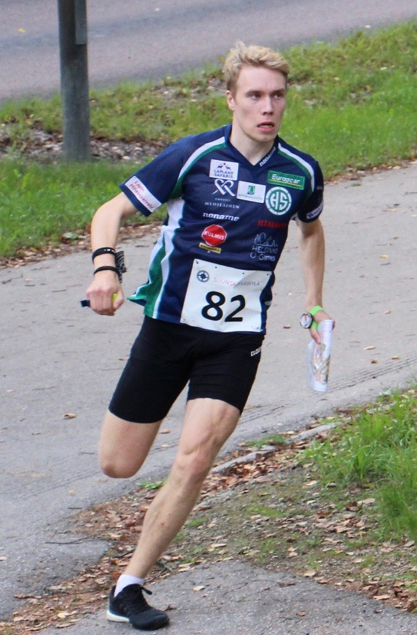 Olli Ojanaho Jyvässprintissä 31.8.2019